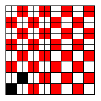 Das Bild zeigt die Bindungspatrone für eine Panamabindung. In farbigen Felder sind Kettfäden oben, in weißen Felder sind Schussfäden oben.Schwarze Felder zeigen den Rapport an.